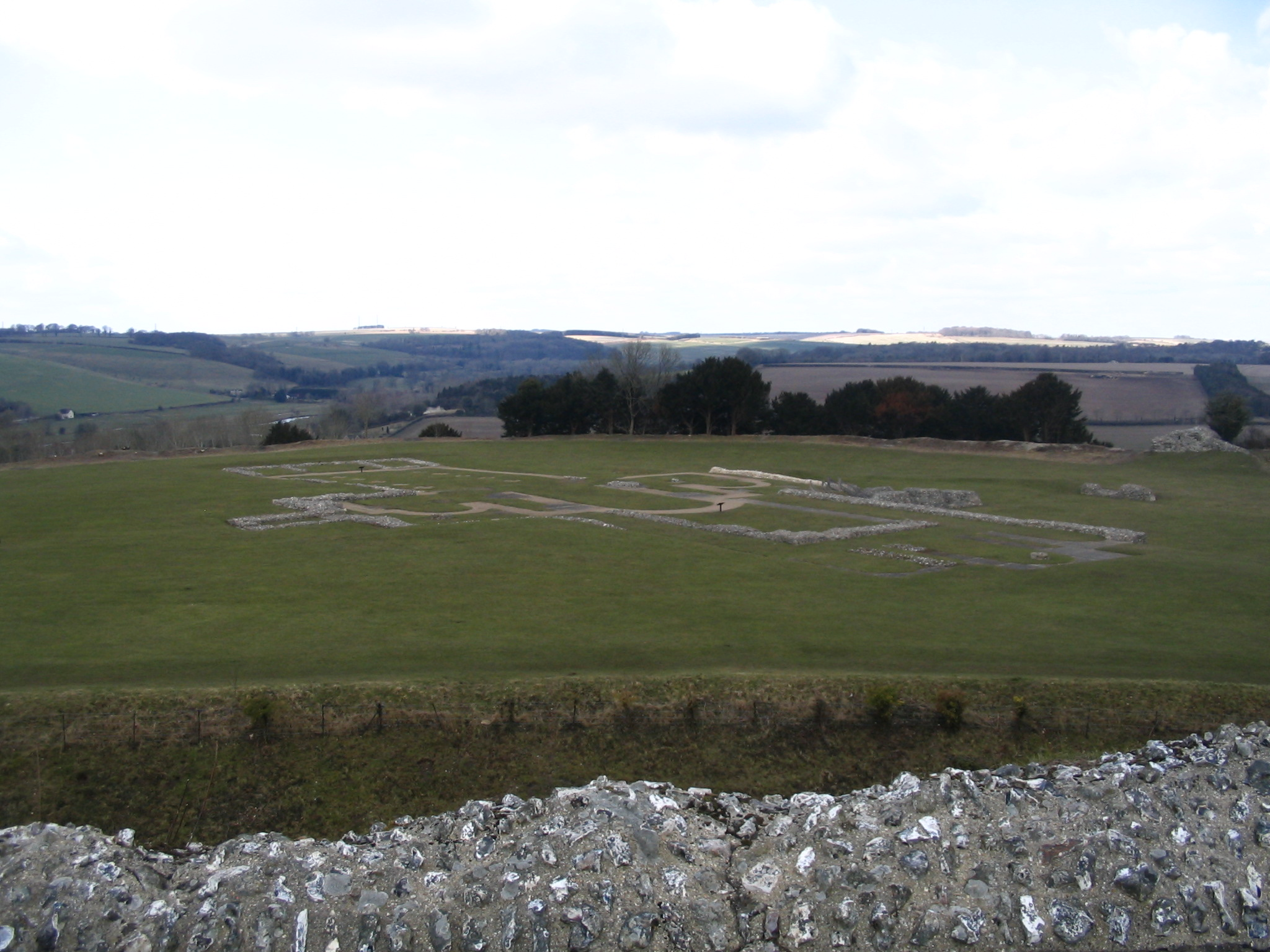 Останките на катедралата в Стар Сарум, (Old Sarum), Солсбъри, Англия